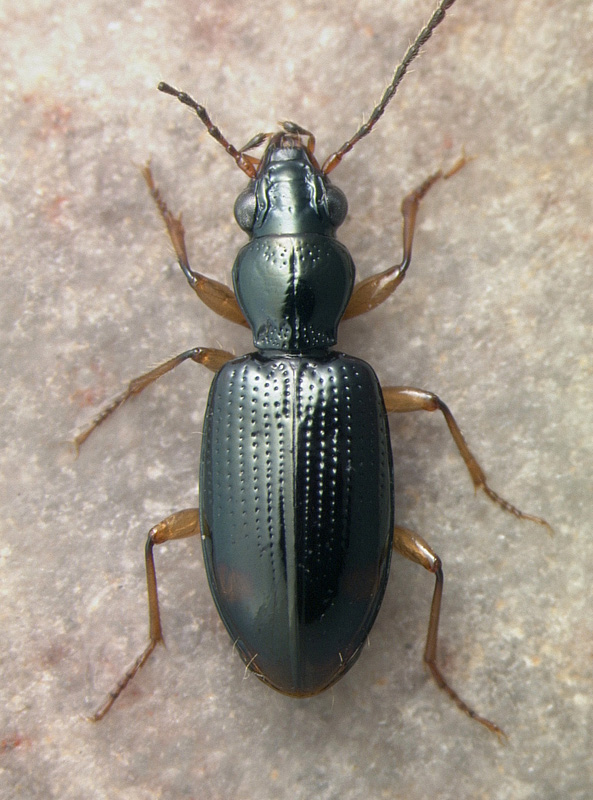 Sinechostictus elongatus female, location: Spain: Madrid: Rio Cofio, near Santa Maria de la Alameda